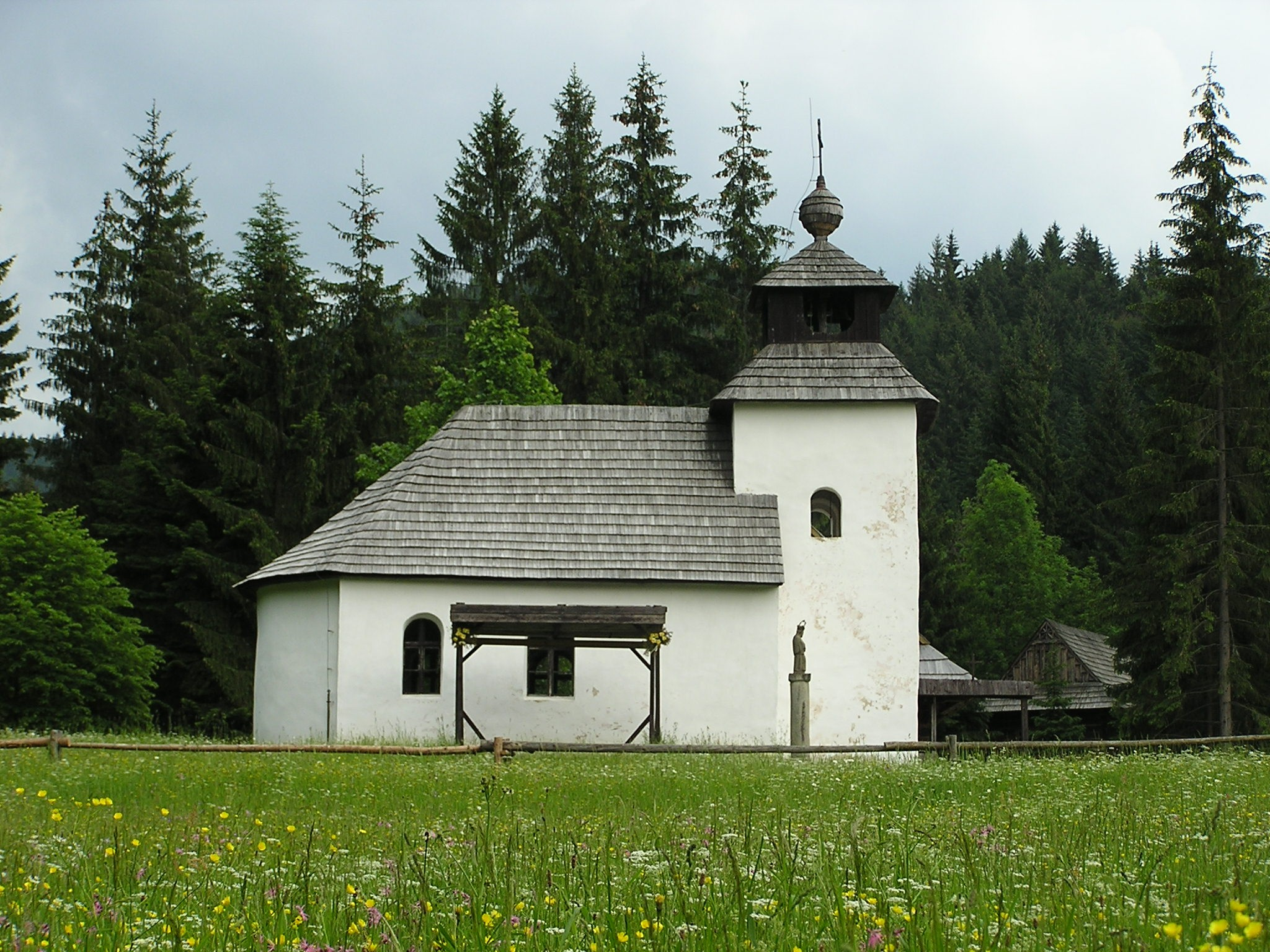 Kaplnka Zborov nad Bystricou, Museum Vychylovka, Slovakia